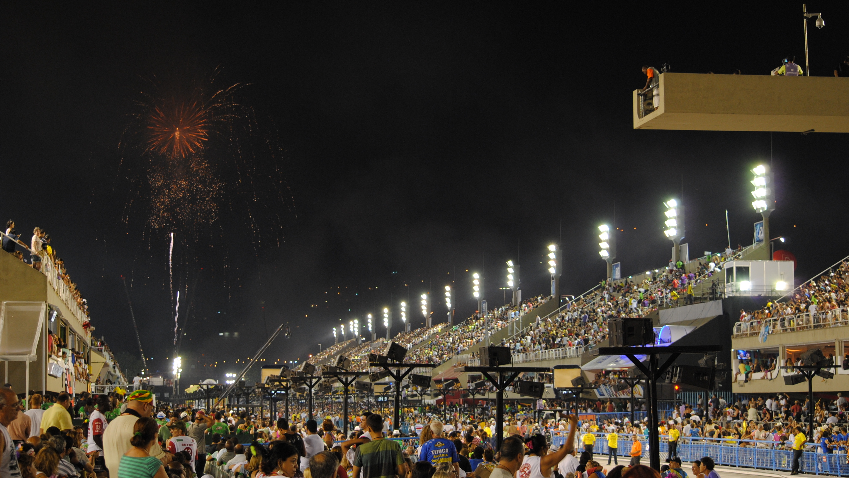 Sambadrome. Carnival parade in Rio de Janeiro.